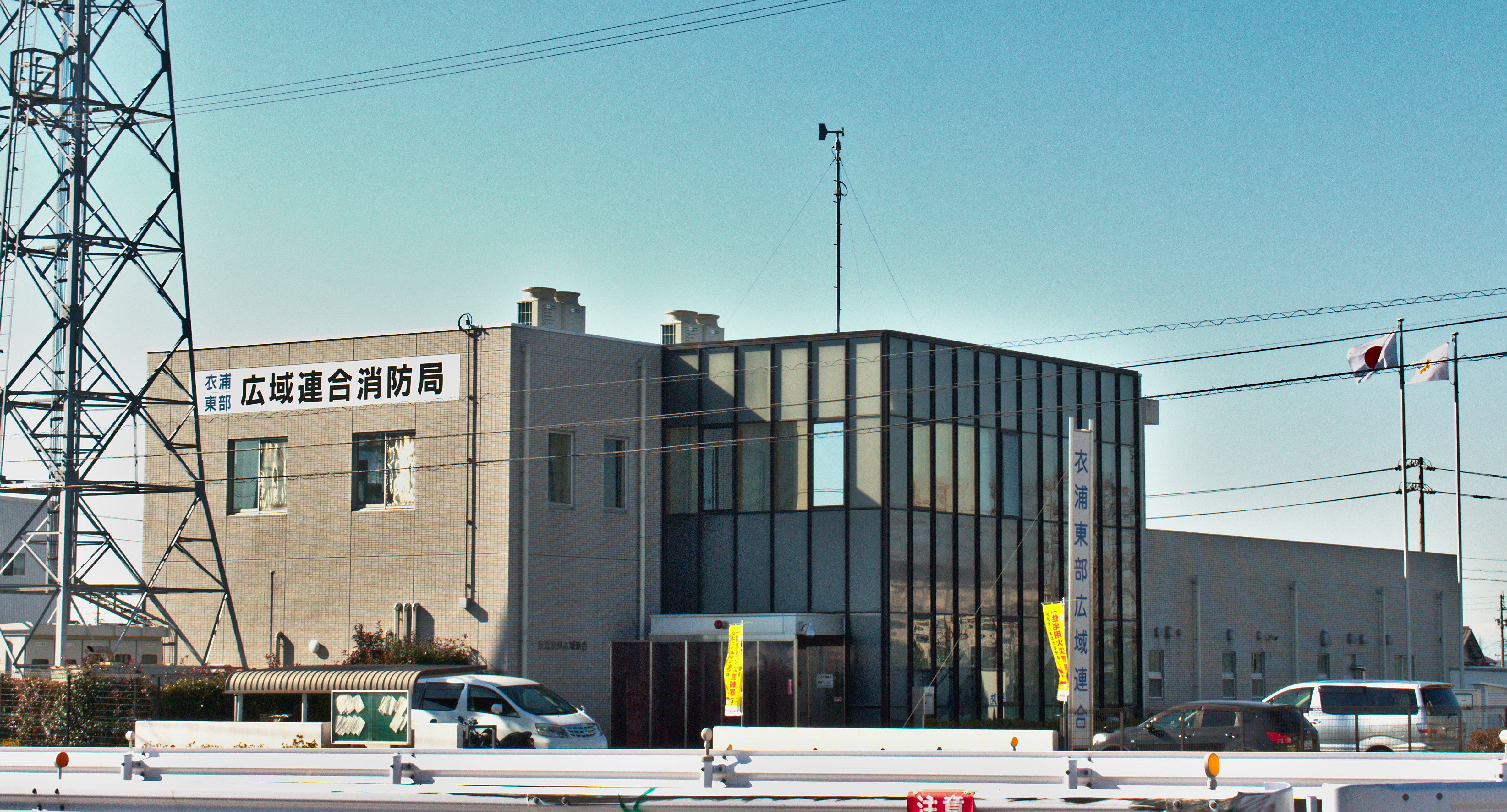 衣浦東部広域連合 本部